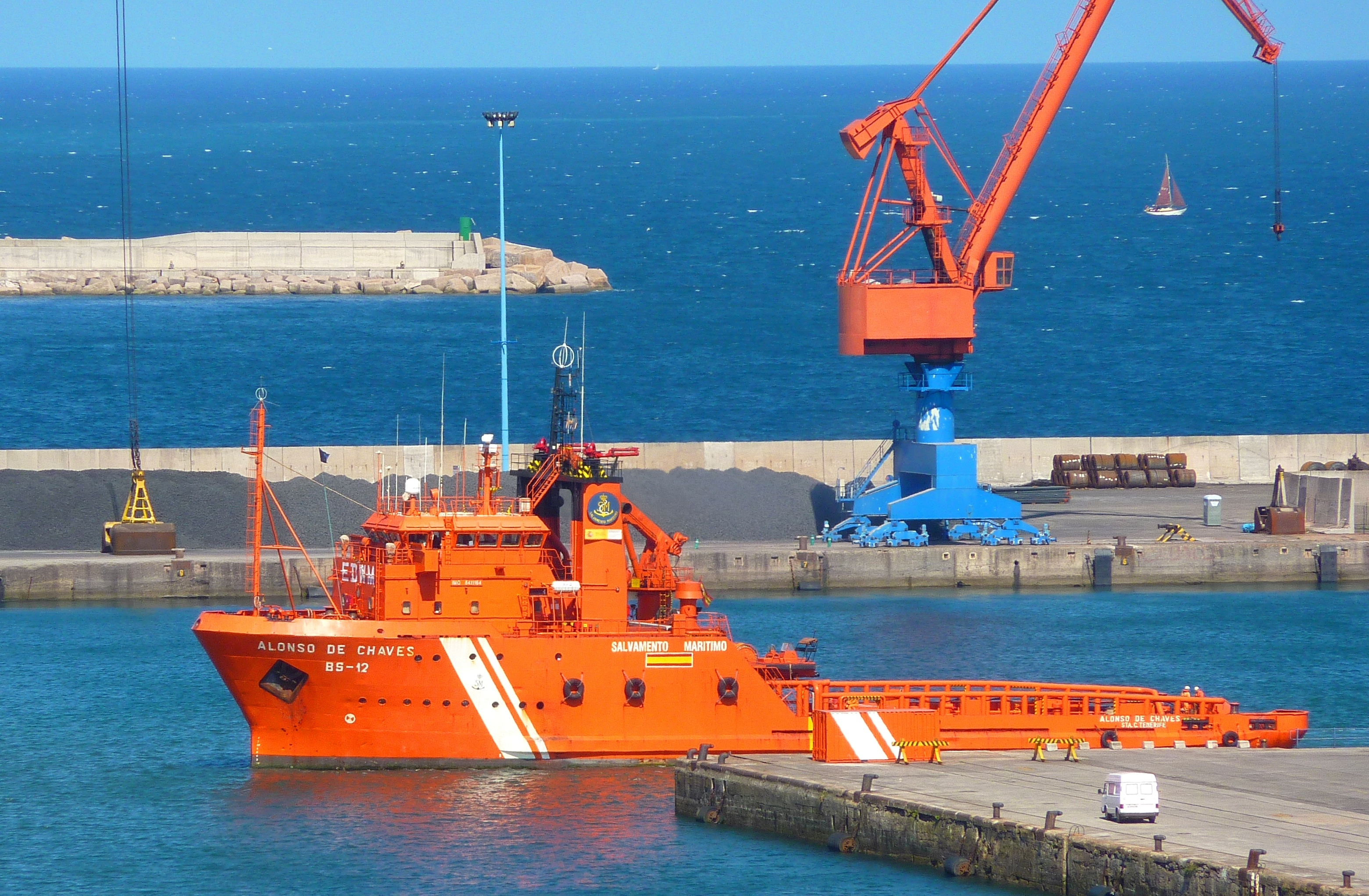 Buque remolcador de la Sociedad de Salvamento y Seguridad Marítima "Alonso de Chaves", BS-12.